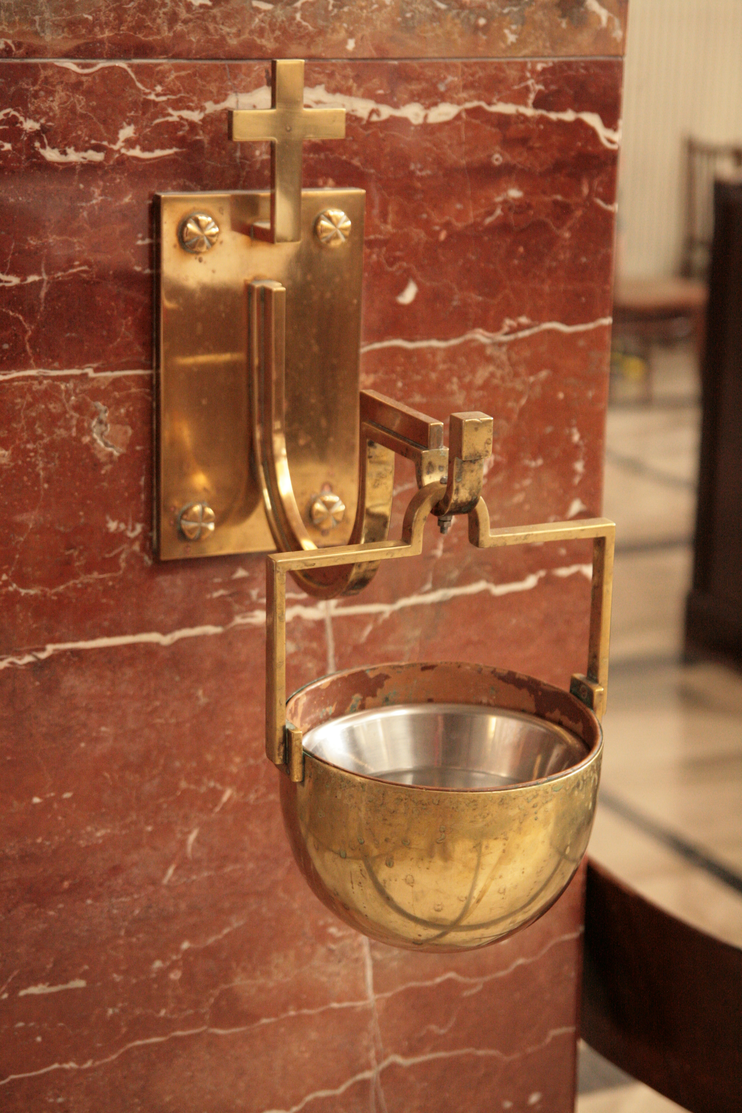 Vnitřek kostela svatého Augustina na náměstí Míru v Brně. Kovová kropenka u vstupu do hlavní lodě kostela.